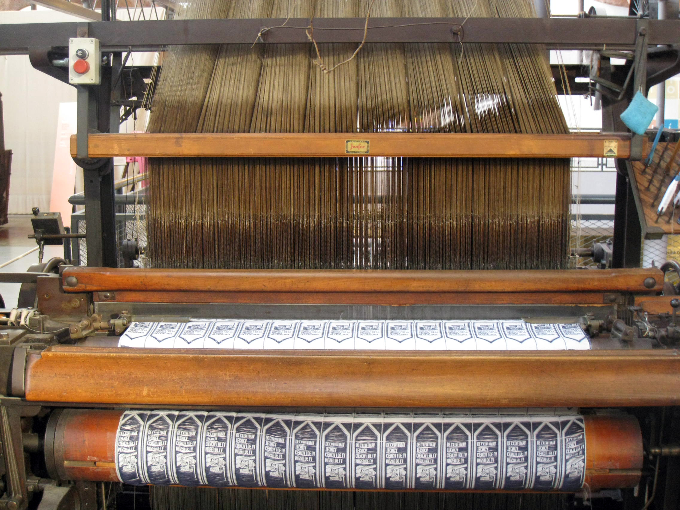 Fàbrica Aymerich, Amat i Jover (Terrassa) Object location41° 33′ 54.49″ N, 2° 00′ 28.14″ E